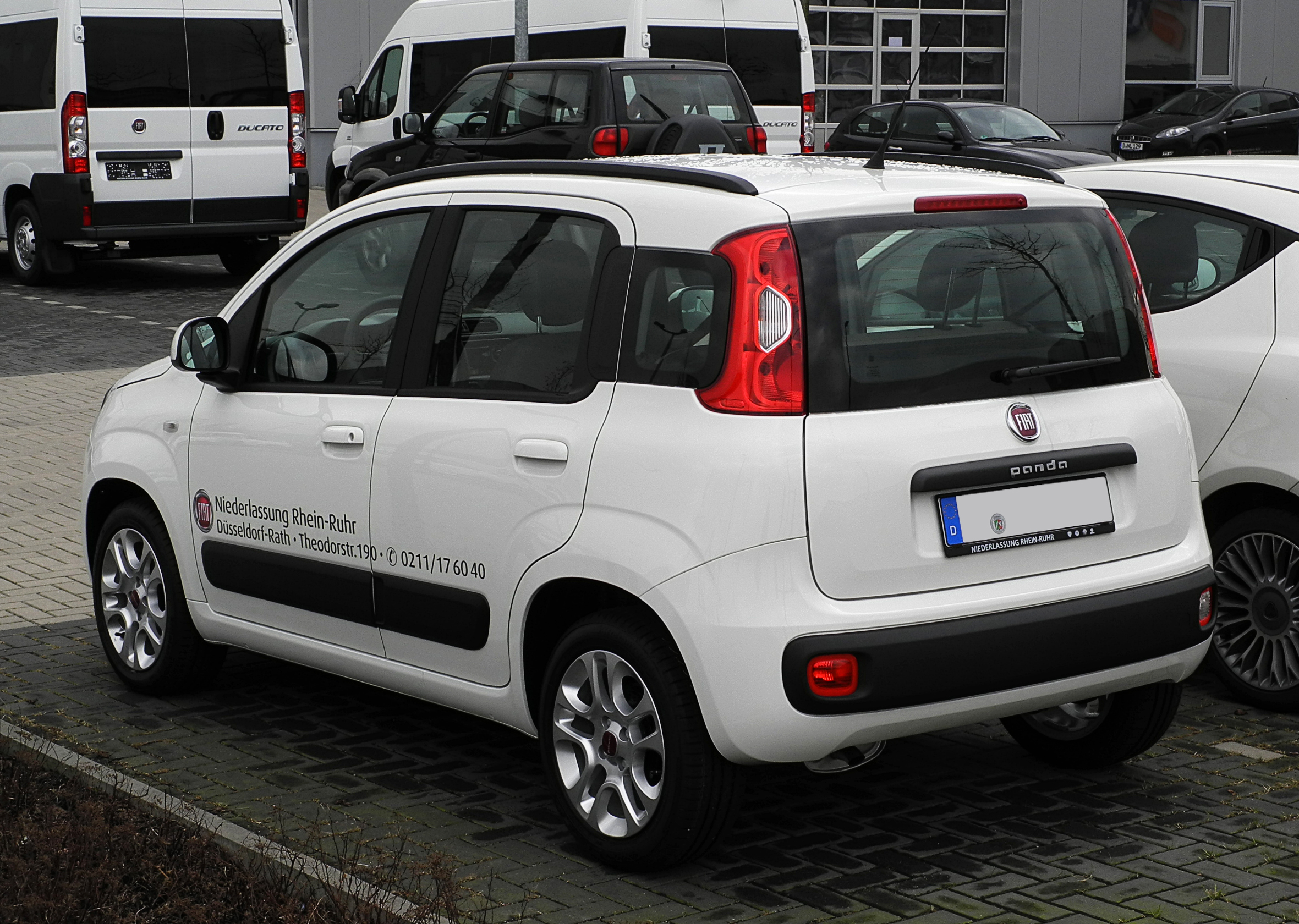 Fiat Panda 1.2 8V Lounge (III)